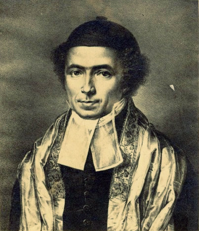 אחד מזוג תצלומי רפרודוקציה, בלתי זהים, מהדפס ובו ציור דיוקנו של המטיף גוטהולד סלומון: גוני חום, בתבנית Carte de visite. תצלומים אלה הופקו באופן מסחרי על ידי הוצאת פופלאואר - M. Poppelauer's Buchhandlung, Berlin כנראה ברבע האחרון של המאה התשע עשרה.